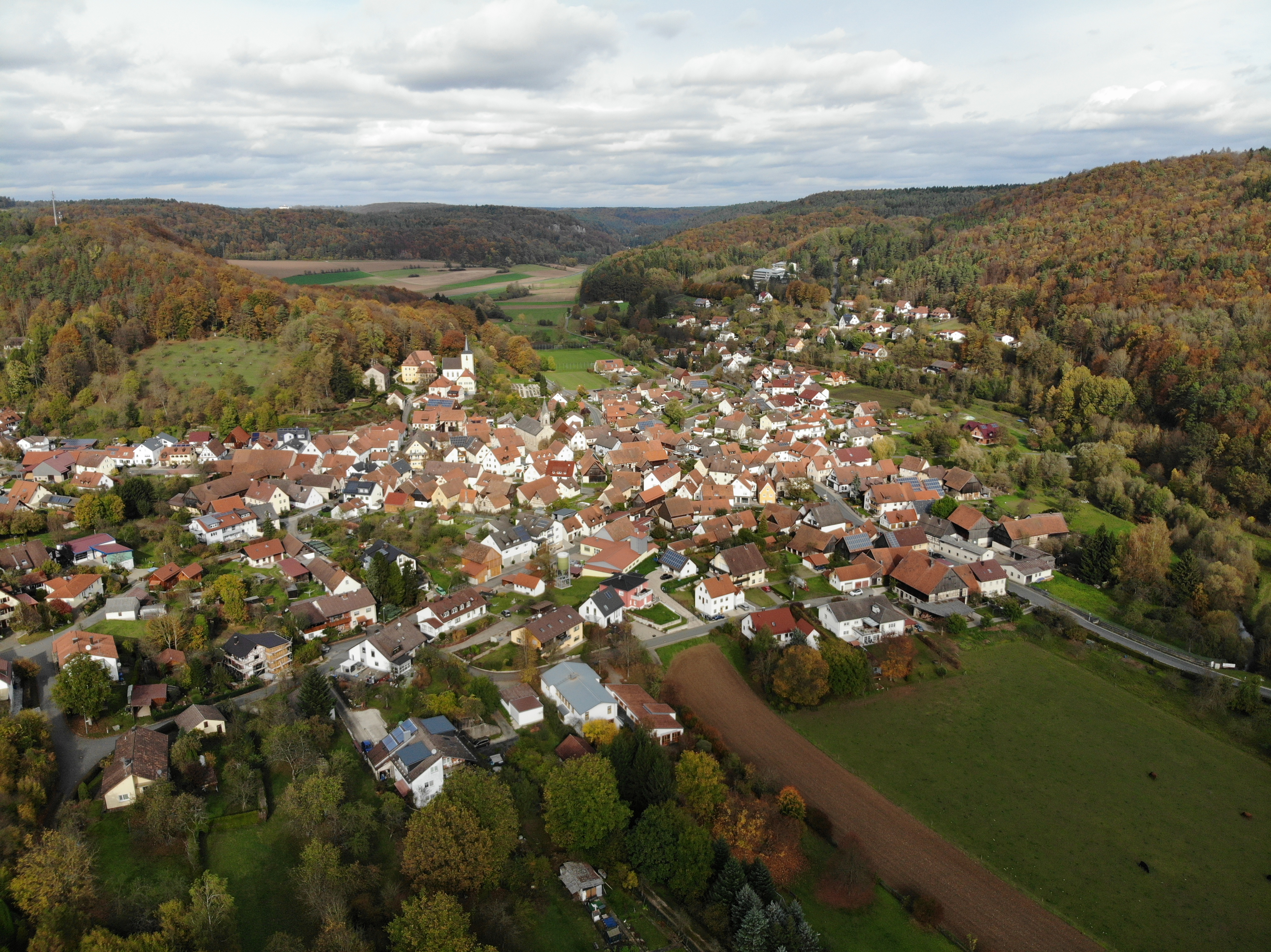 Unterleinleitner Luftaufnahme (2019)